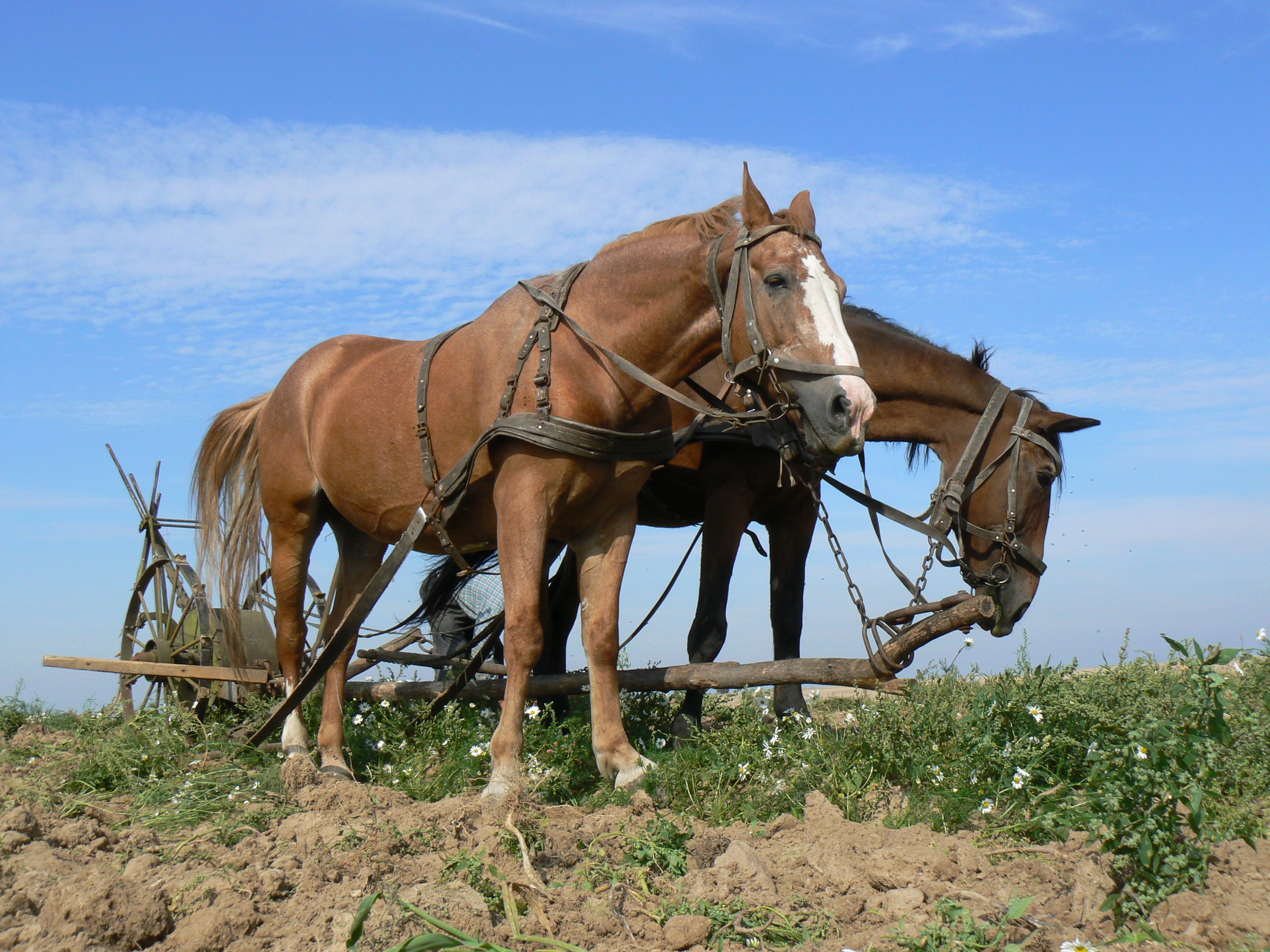 Konie w zaprzęgu